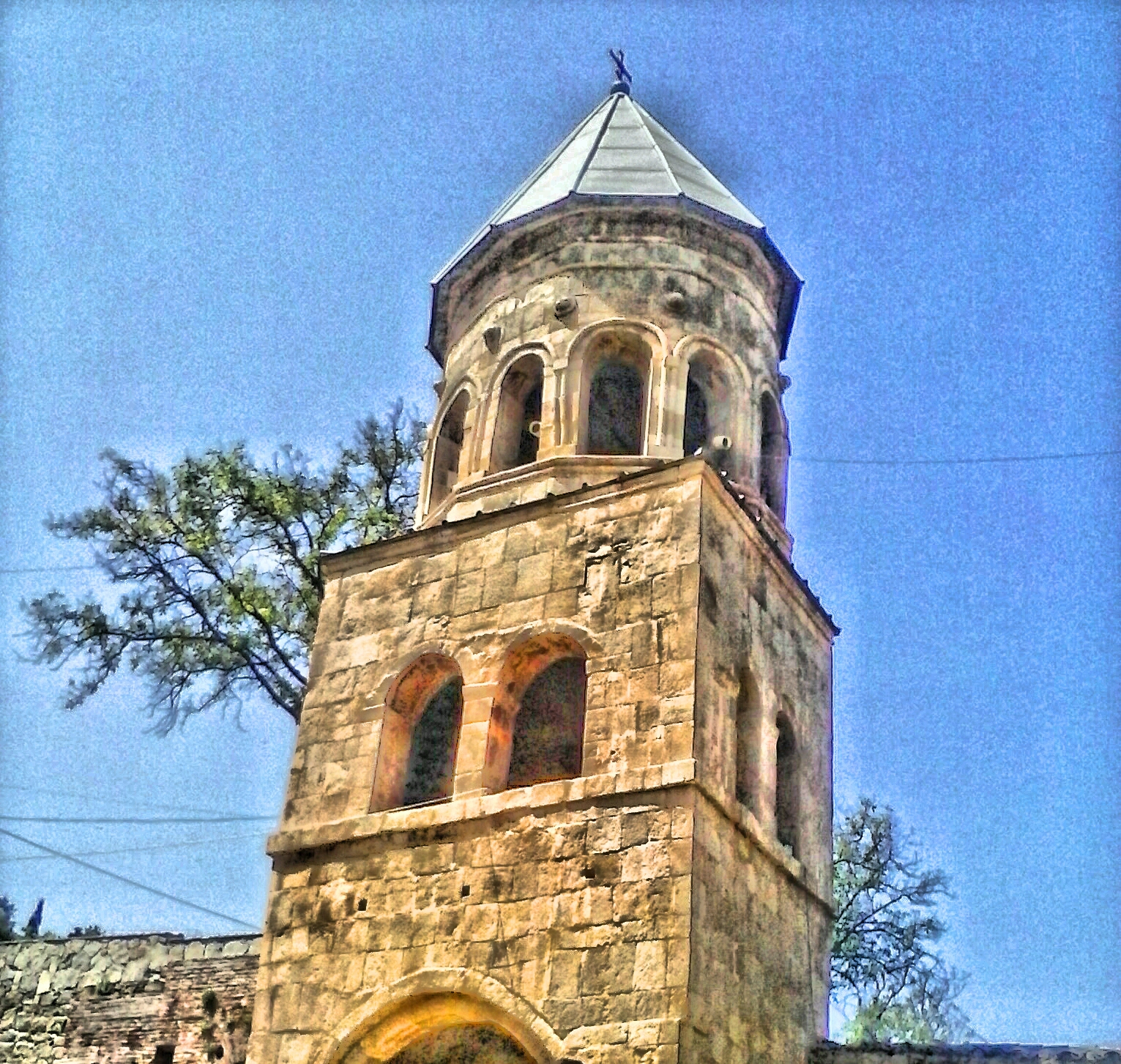 სამრეკლო